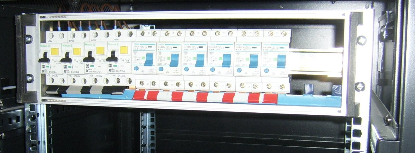 Montaż aparatury modułowej na szynie DIN w rack'u 19""